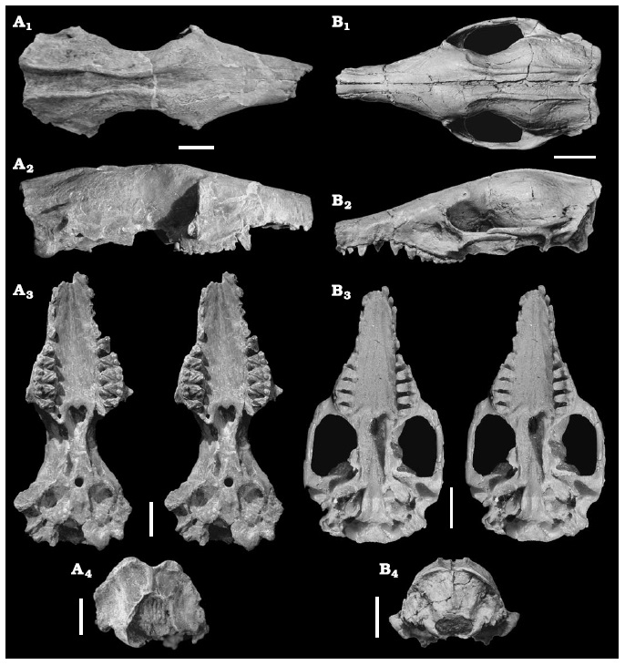 Leptictid insectivore skulls. A. Megaleptictis altidens gen. et sp. nov., holotype (KUVP 2568), from the latest Eocene or earliest Oligocene of South Dakota’s White River Group, compared to the common species of this time; A1, skull in dorsal view, note the postorbital constriction of the parasagittal crests; A2, lateral view, the teeth and rostrum are taller than in L. dakotensis; A3, stereo pair, ventral view, palate shape, middle ear region, and general tooth features are similar to L. dakotensis; A4, occipital view, the occipital region is blockier than in L. dakotensis. A portion of the supraoccipital region is broken away. B. Leptictis dakotensis Leidy, 1868 (F:AM 108194) from the earliest Oligocene of North Dakota’s White River Group; B1, dorsal view, the parasagittal crests are nearly straight and parallel; B2, lateral view; B3, stereo pair, ventral view; B4, occipital view. Photographs (B1, B2, and B4) from Novacek (1986: fig. 2). Scale bars 10 mm.